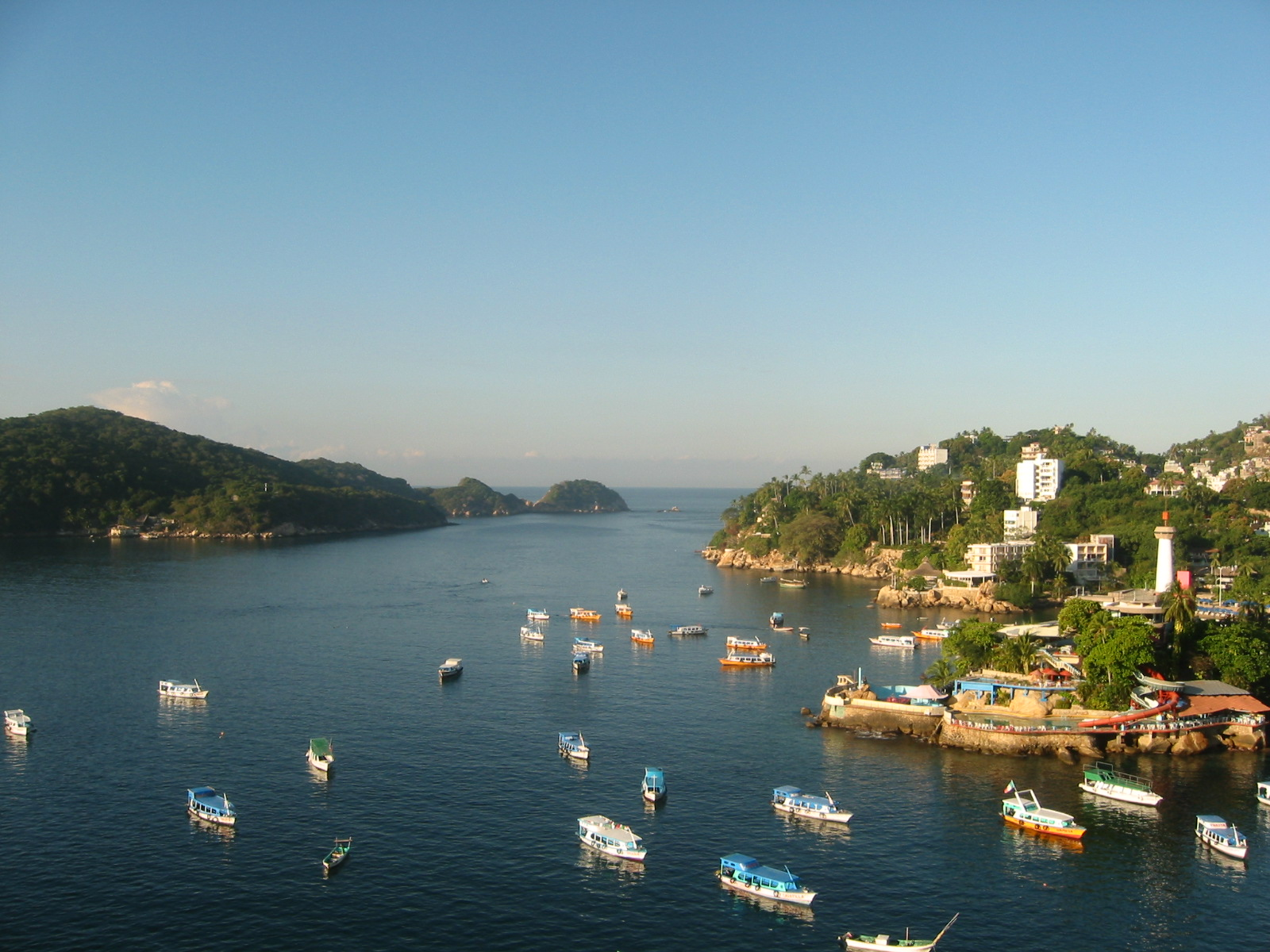 Canal de Boca Chica, a la derecha, las playas de Caleta y Caletilla, a la izquierda, la isla La Roqueta en Acapulco, Guerrero, México.